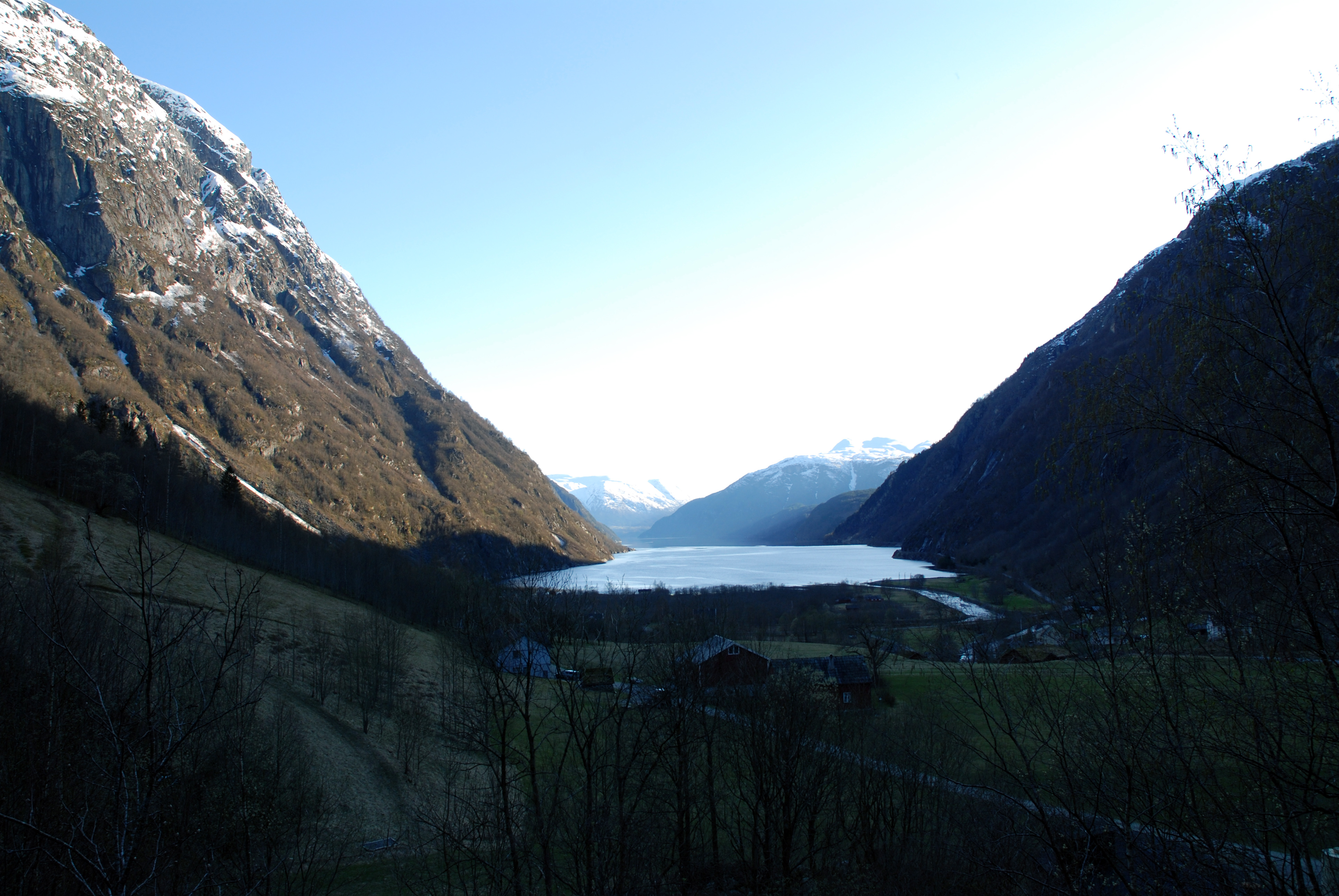 Osa, in Ulvik, Hordaland, Norway.